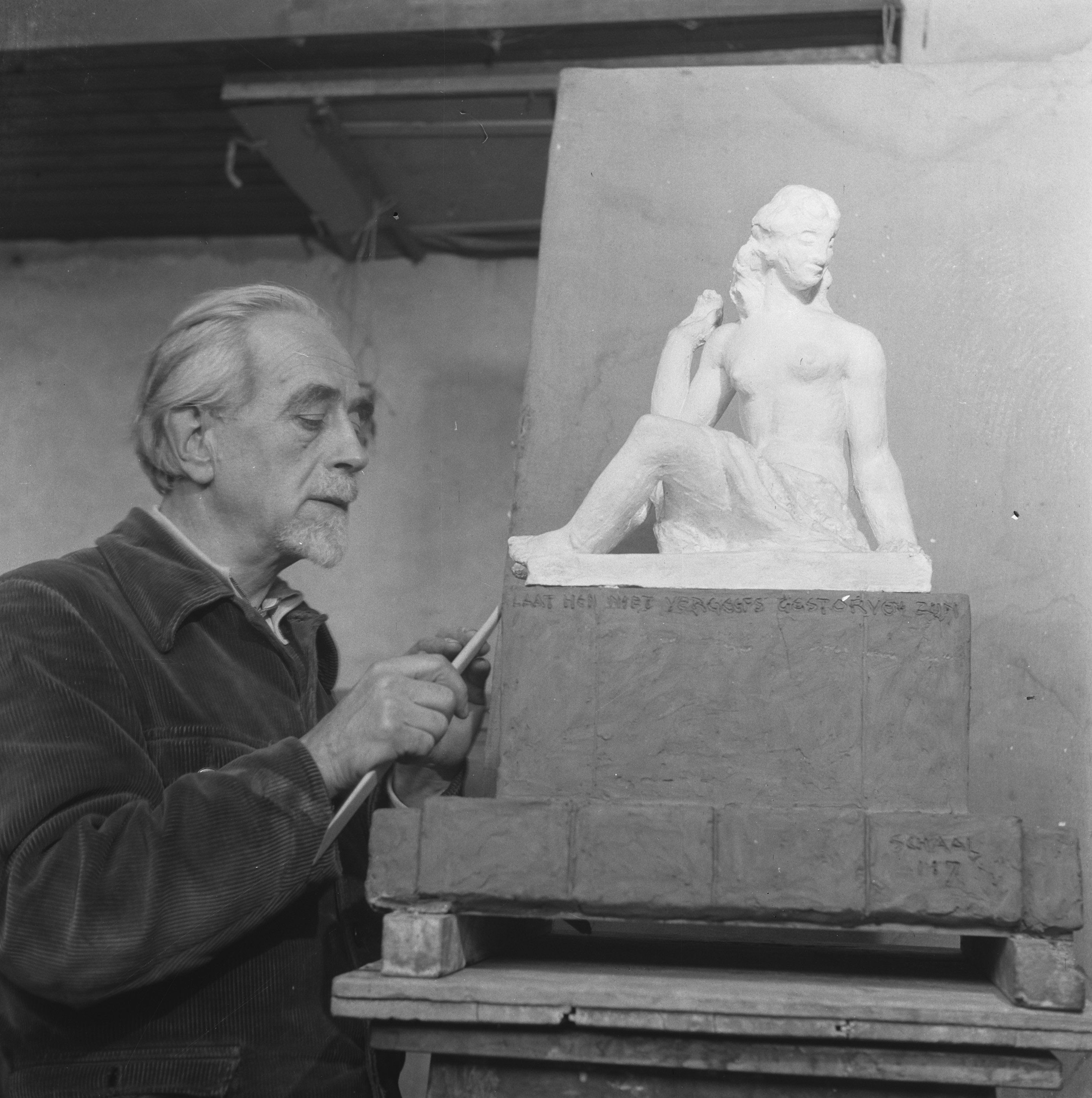 Theo van Reijn werkend aan zijn monument voor Zaandam. Tekst op het beeld: "Laat hen niet vergeefs gestorven zijn".